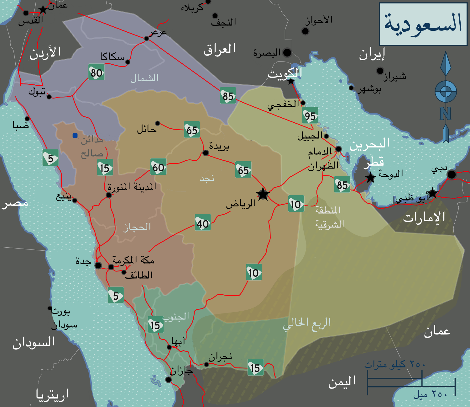 خريطة لمناطق السعودية للإستخدام في ويكي الرحلات